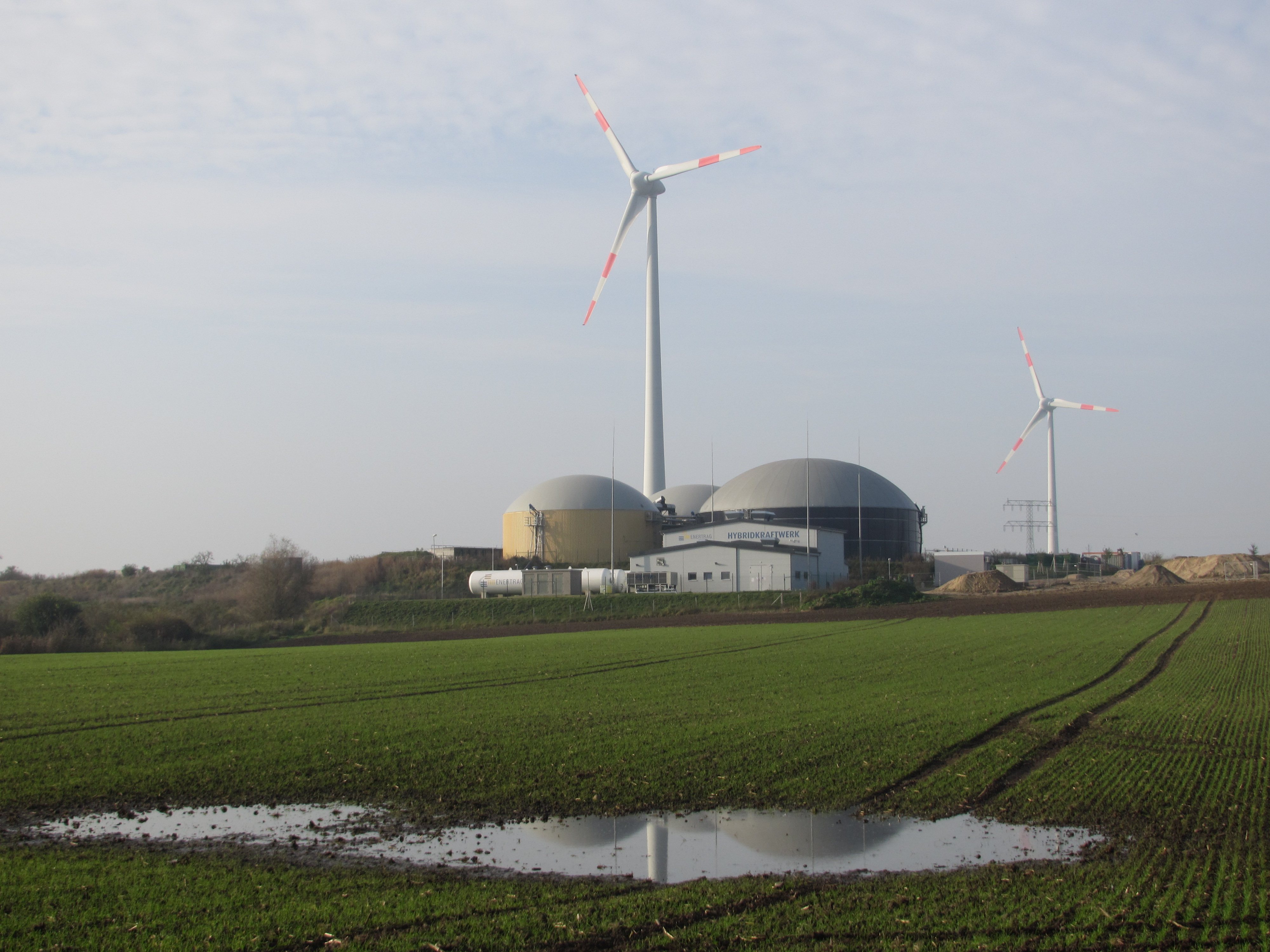 Hybridkraftwerk-hybrid-power-plant-Windkraftanlage-WKA-bei-Prenzlau